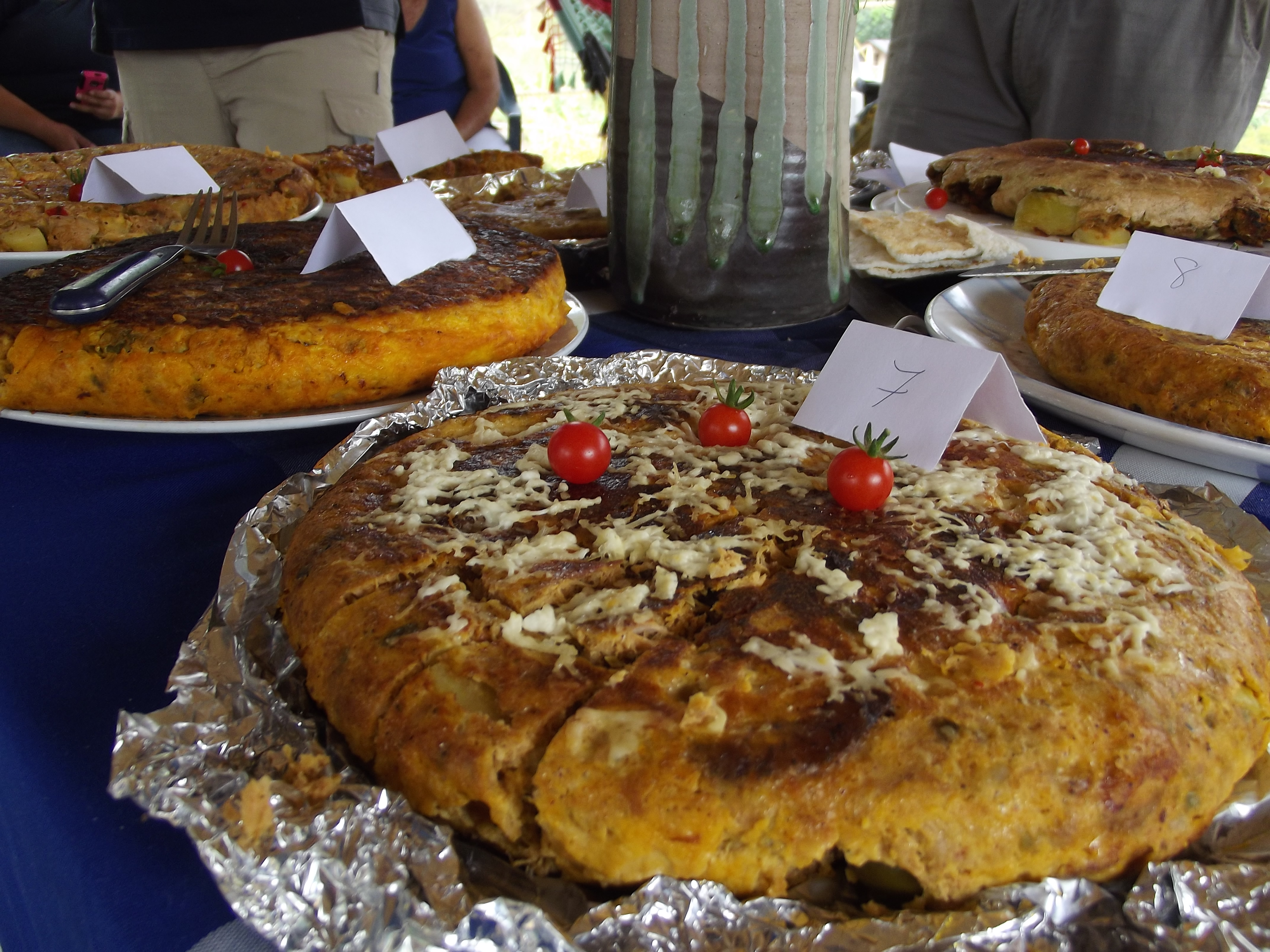 comida tipica del oriente venezolano